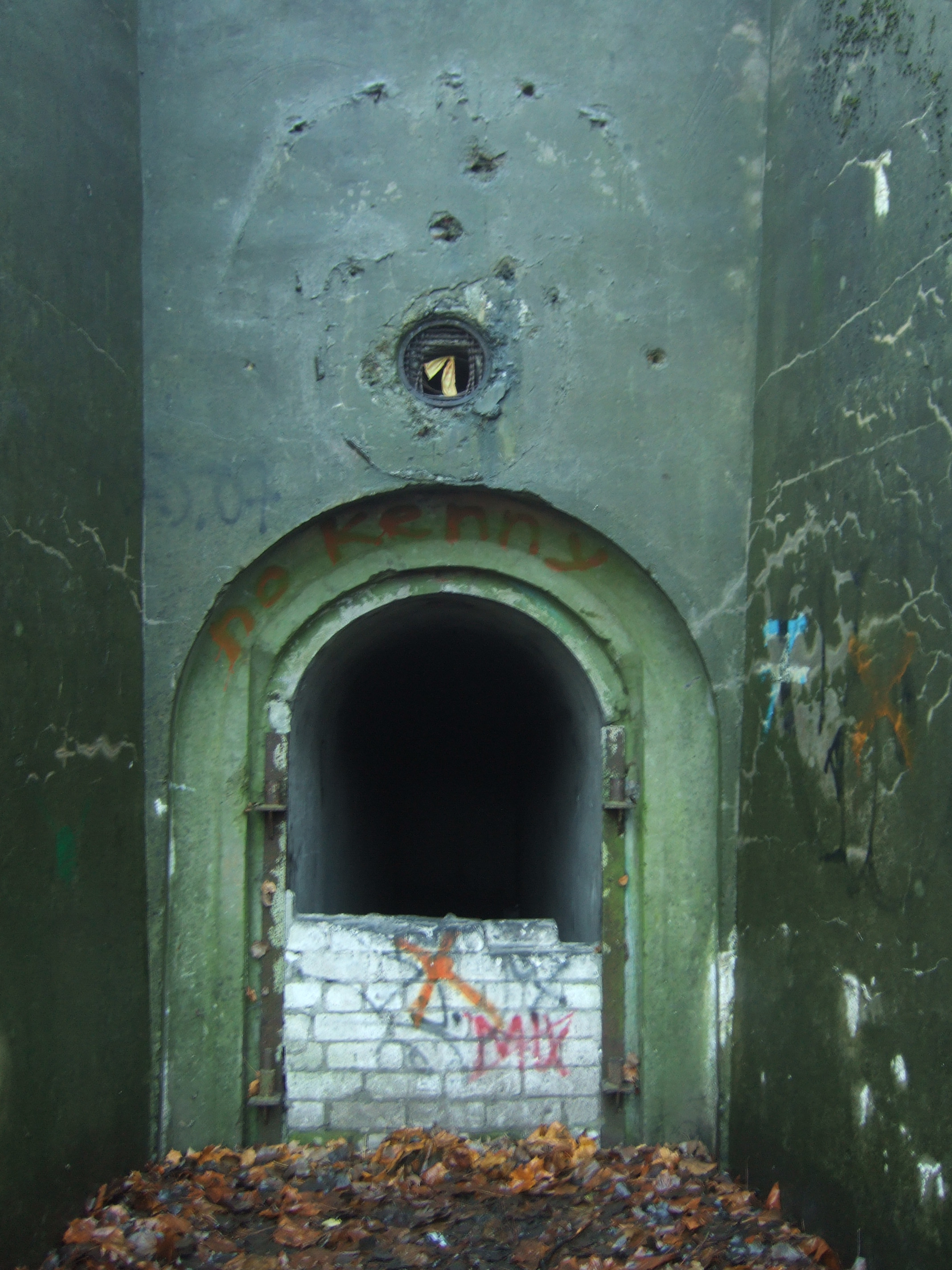 Šnipiškių bunkeriai